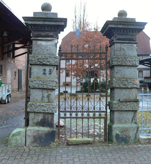 Torpfeiler in Salzdahlum, vermutlich vom Schloss Salzdahlum